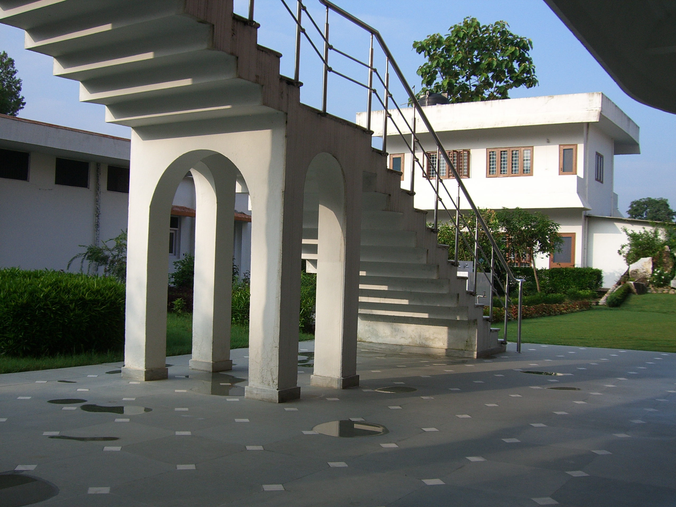 Osho Institute, Dehradun, Uttarakhand, India